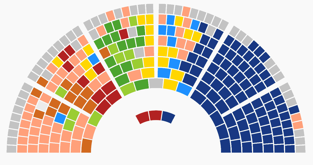 Composition de l'assemblée constituante tunisienne en 2014